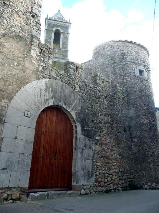 Cal Llossaire, a Vilanant (Alt Empordà)